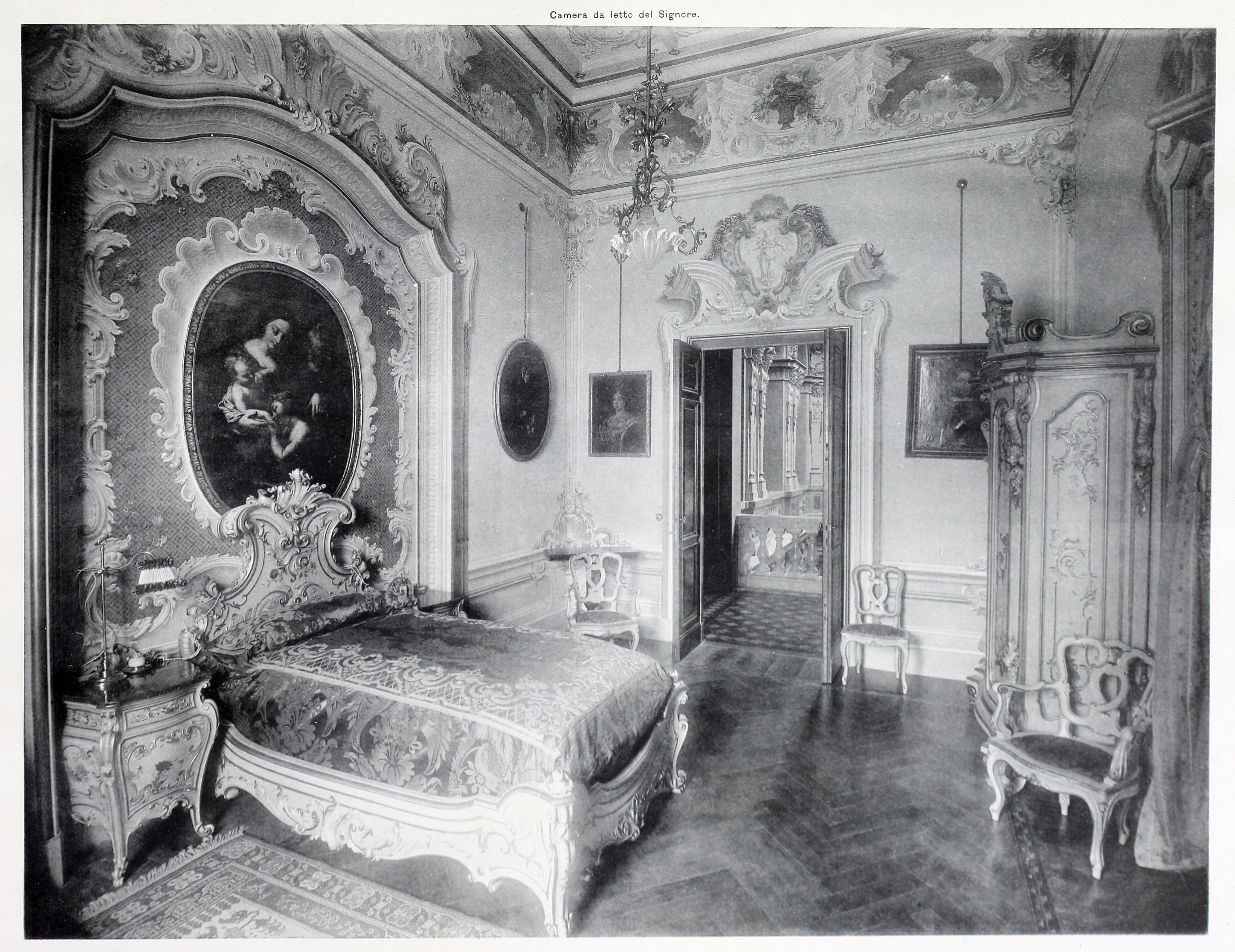 Villa Erba, Cernobbio - camera da letto del Signore (1904), da L'Edilizia Moderna